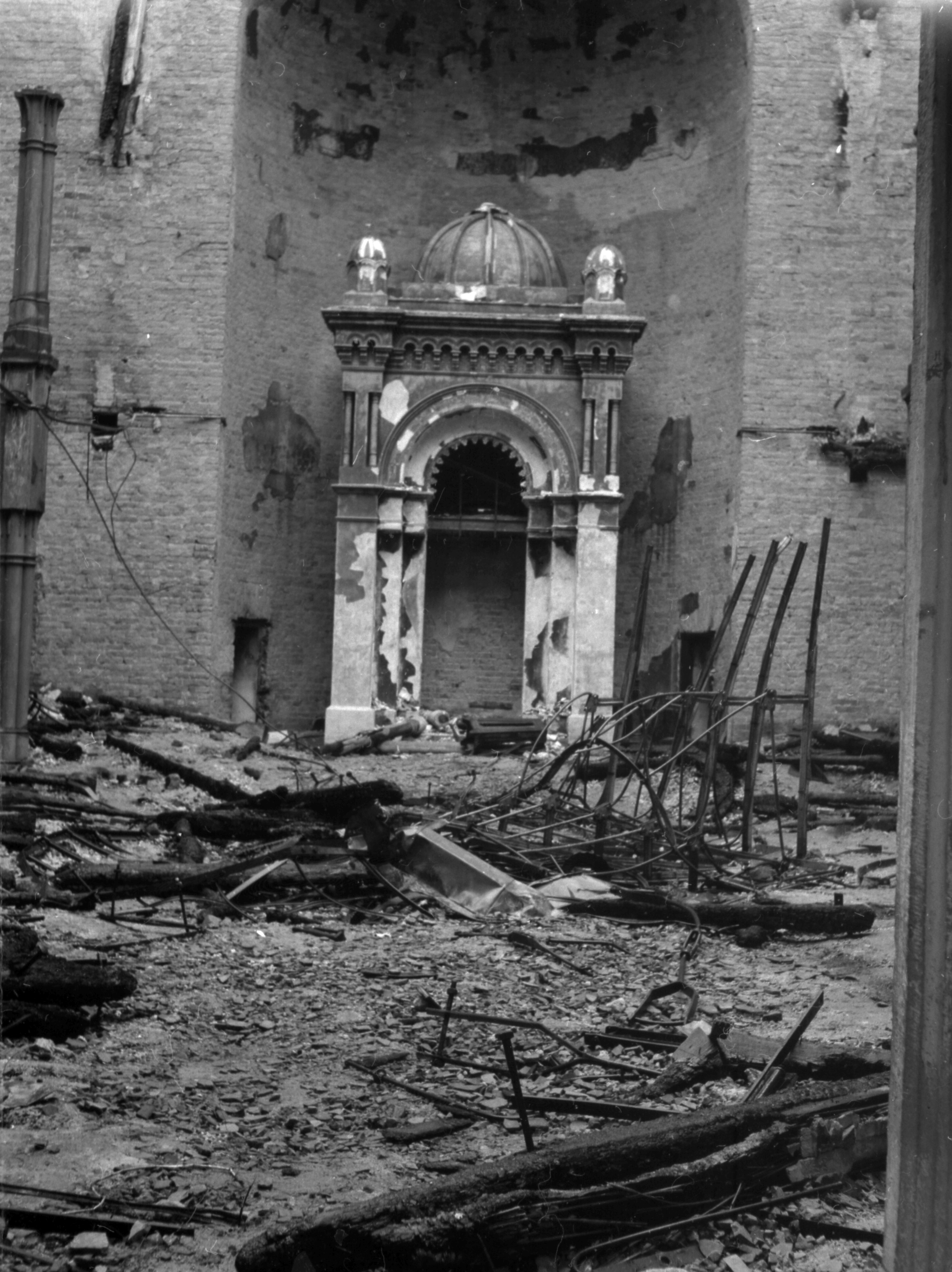 a zsinagóga romjai. Location: Croatia, Osijek Tags: war damage, synagogue Title: a zsinagóga romjai.